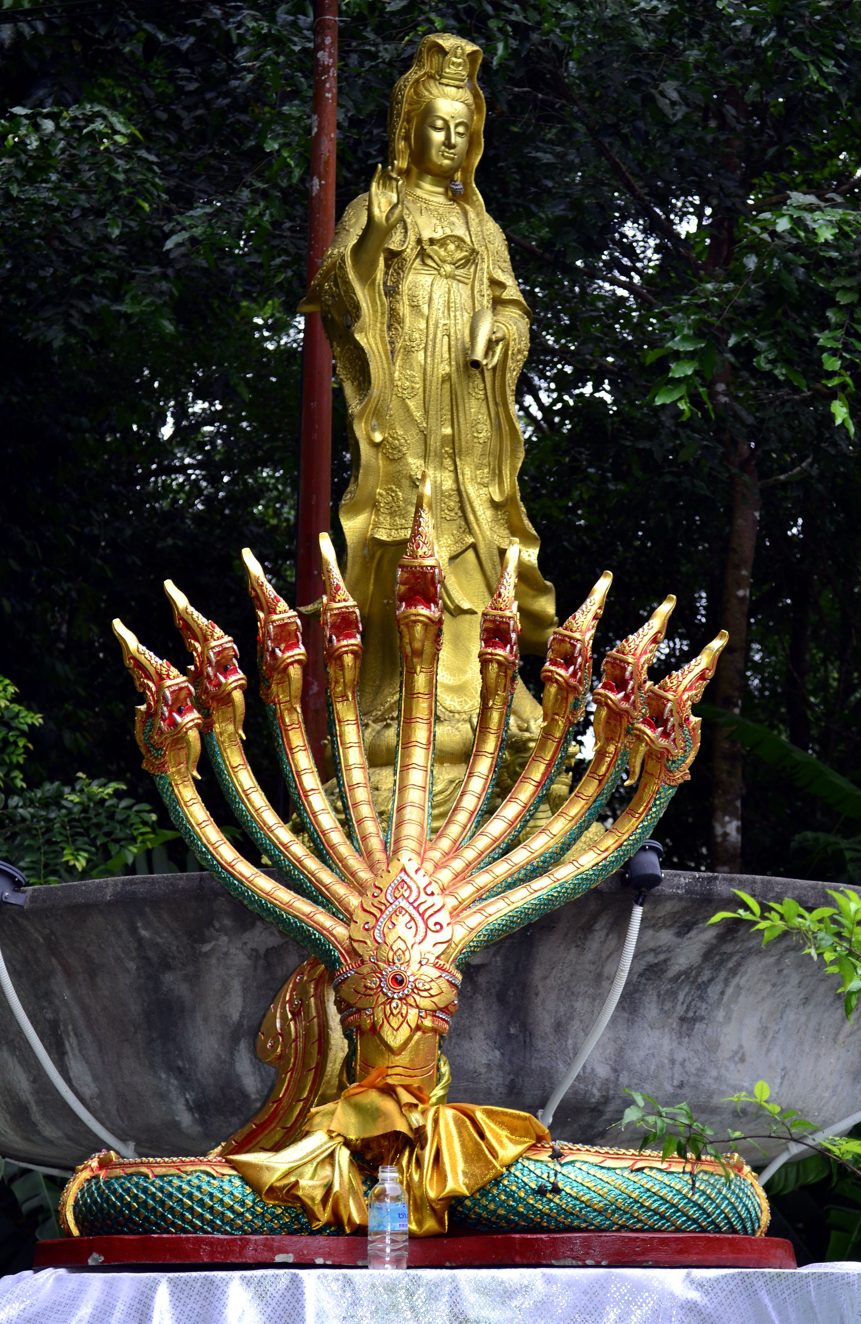 Skulptur der "Große Mutter" vor dem Wat Tham Nakarat, im Vordergrund Naga